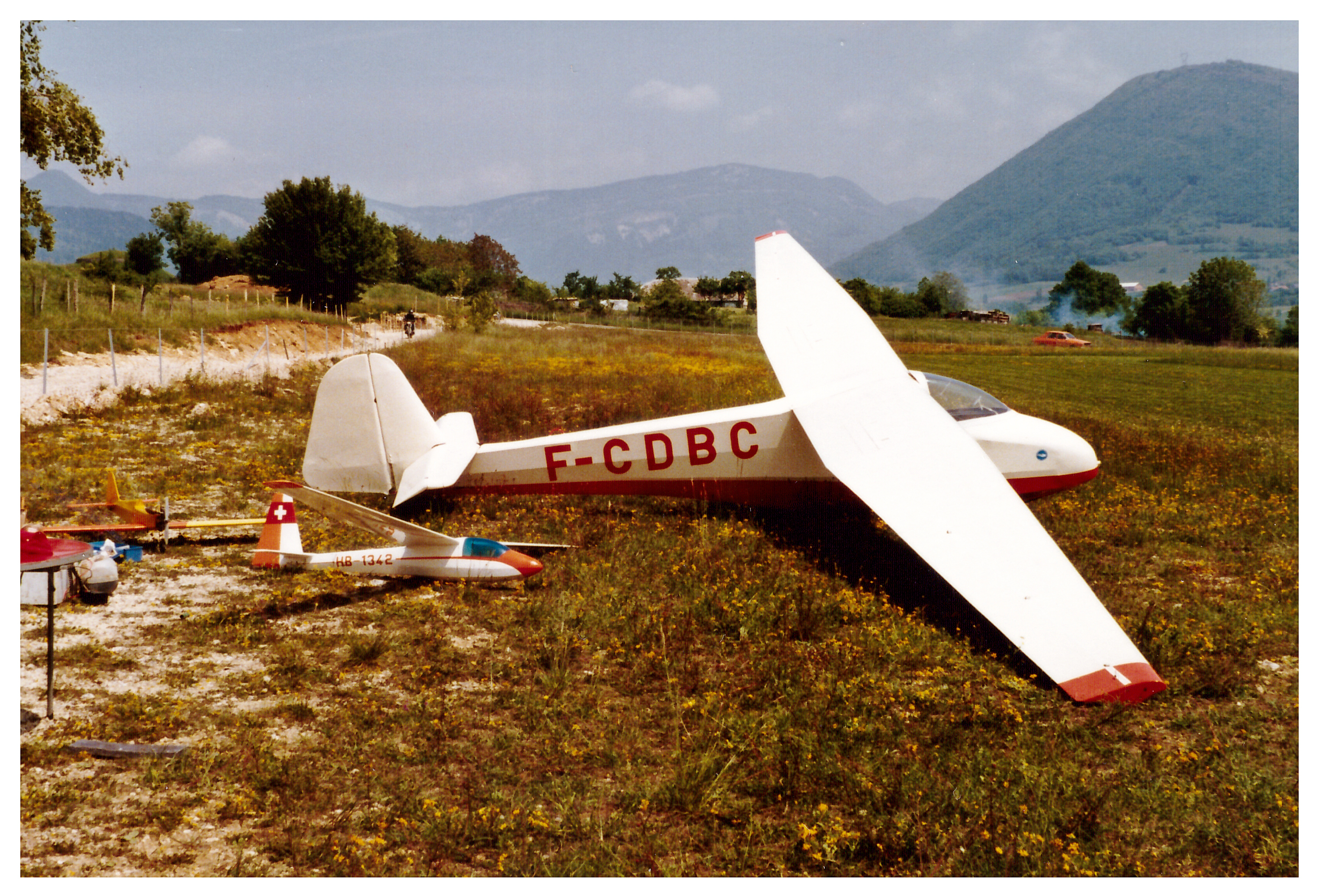 Fauconnet Avialsa A60 sur le terrain de Bellegarde sur valserine. Le modèle réduit est un ASK18